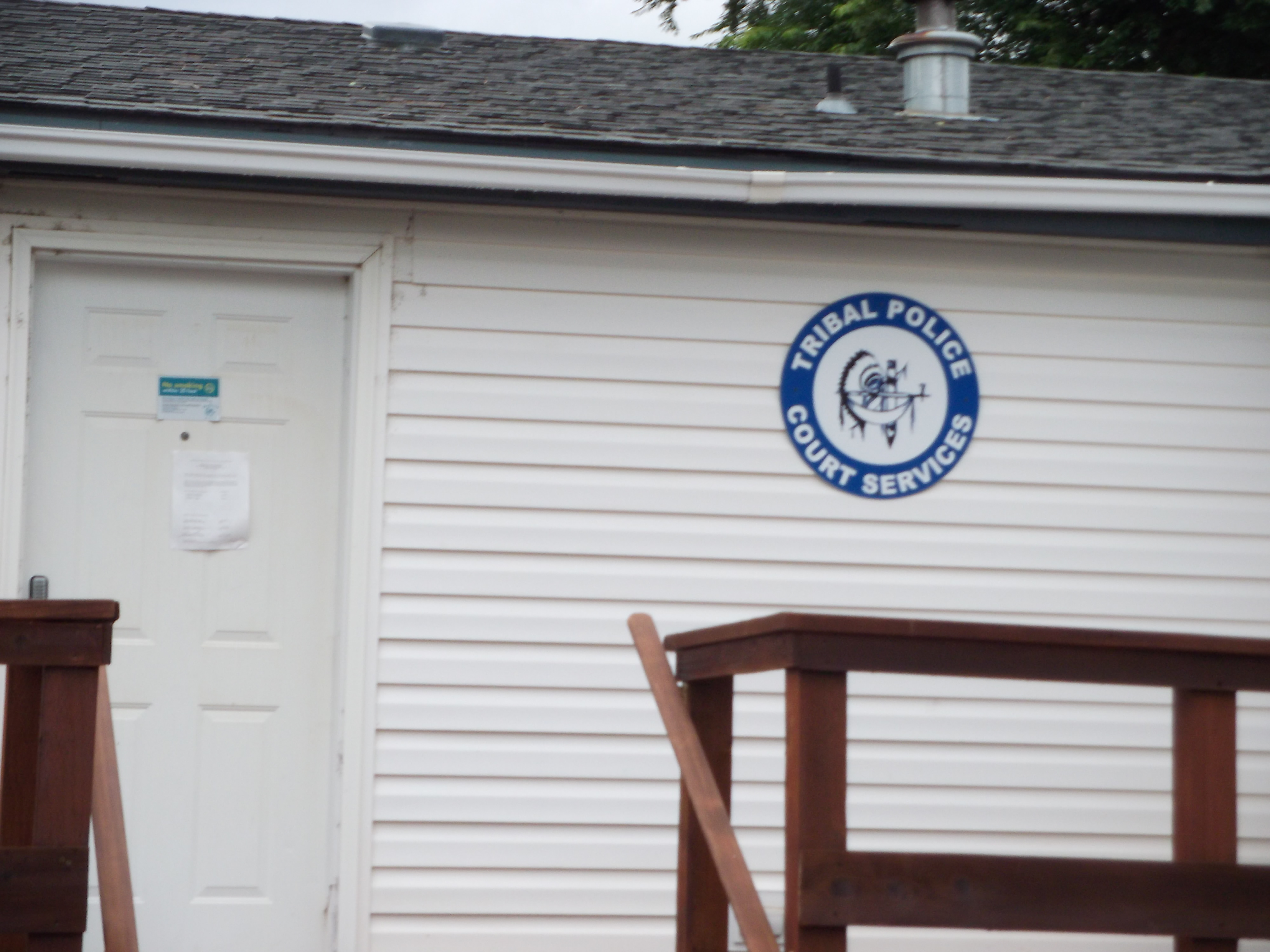 Burns Paiute Police